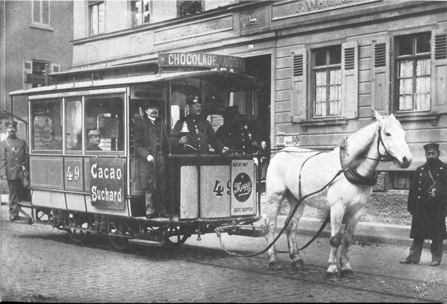 Querlinie der Stuttgarter Pferdebahn vor der Brauerei und Restauration Weinhardt. Heslach, Böblinger Straße 120, um 1893.